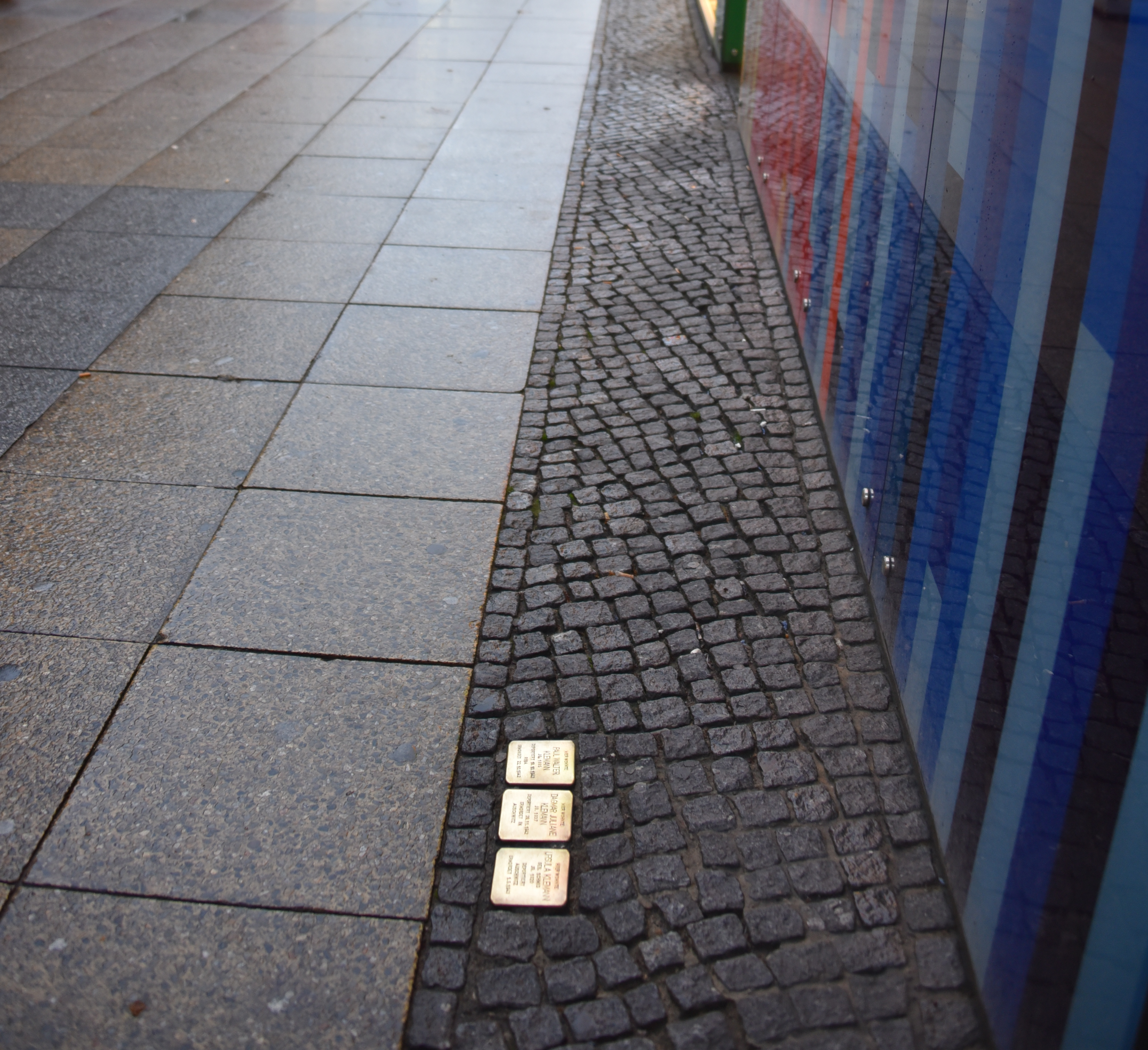 Stolpersteine für Familie Klemann in Berlin-Schöneberg